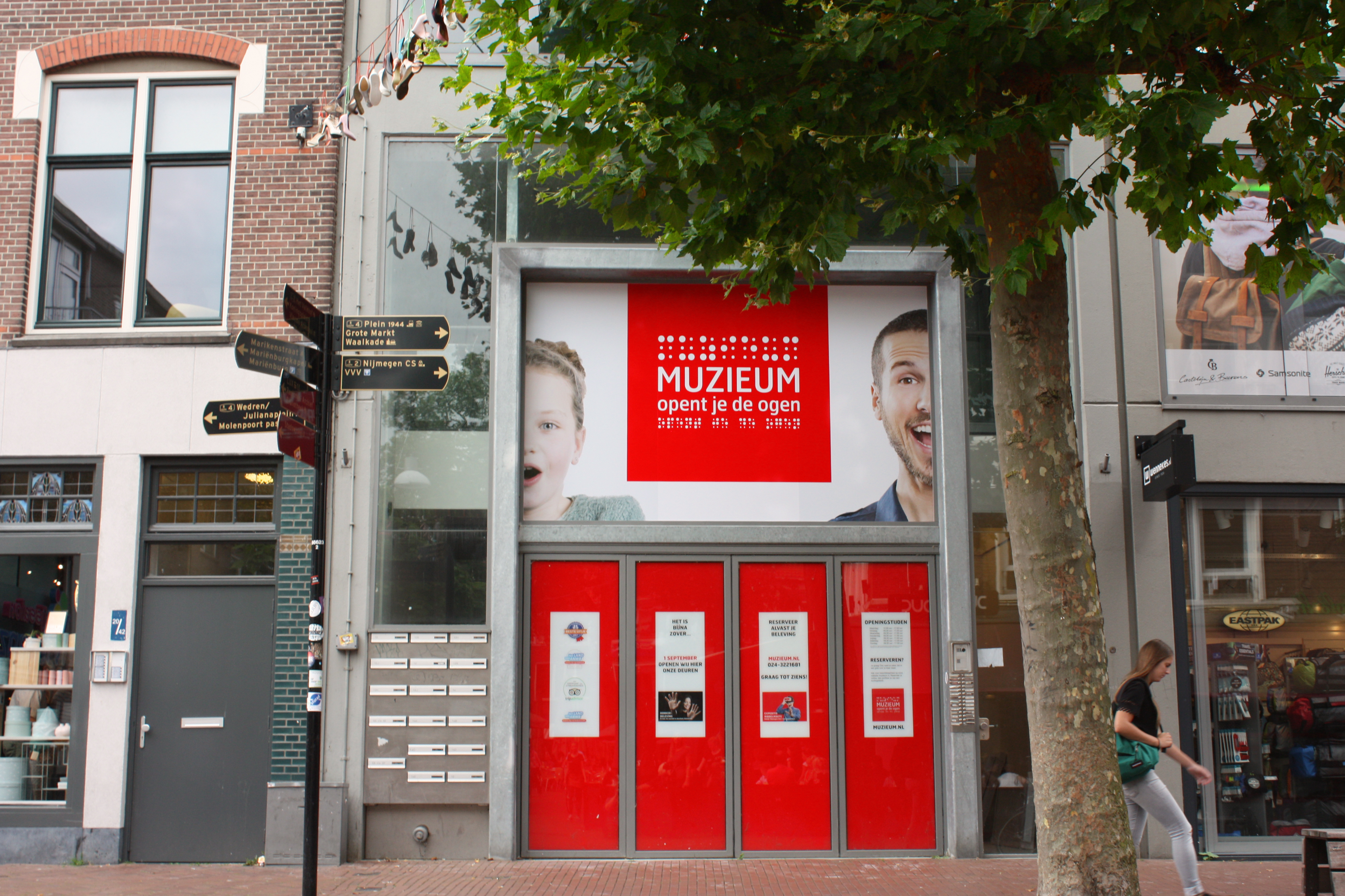 Voorkant muZIEum